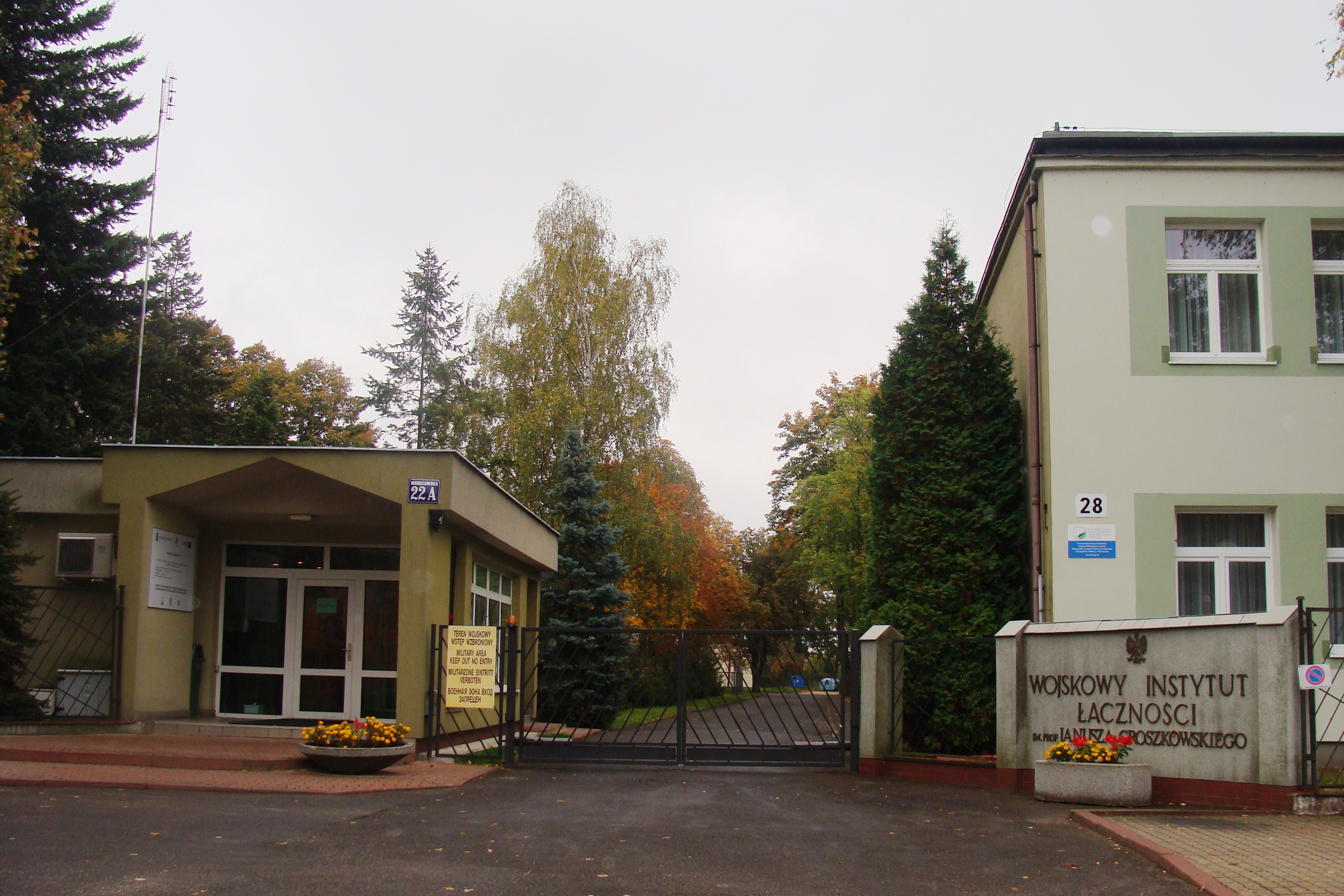 Wojskowy Instytut Łączności w Zegrzu